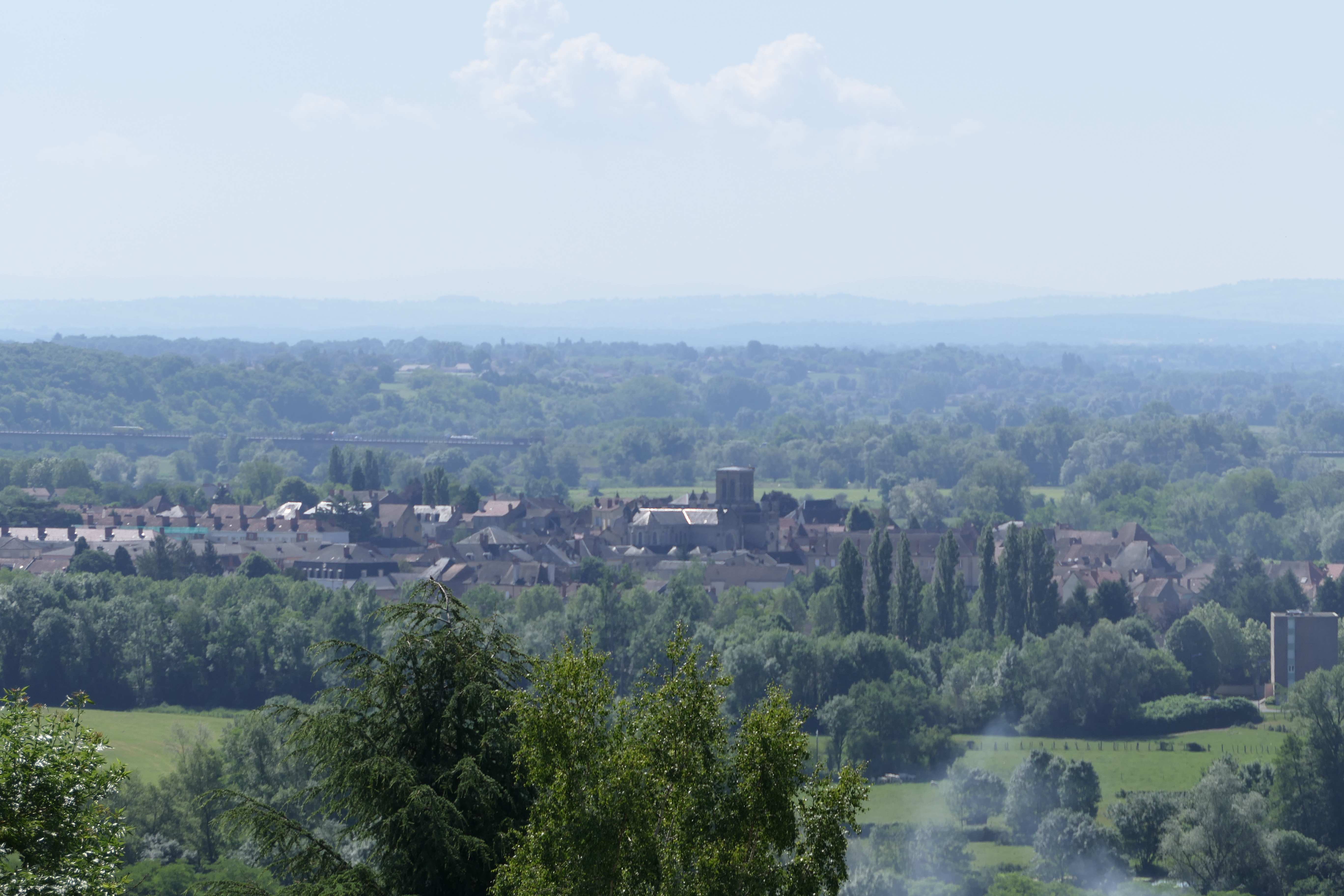 La Motte-Saint-Jean, panorama vue à partir de la terrasse de l'église